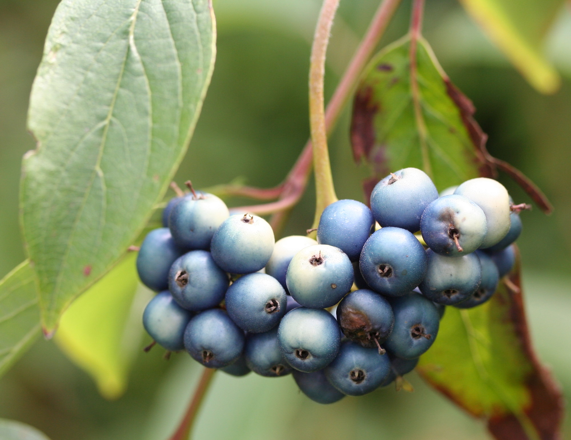 Cornus amomum im Botanischen Garten Dresden